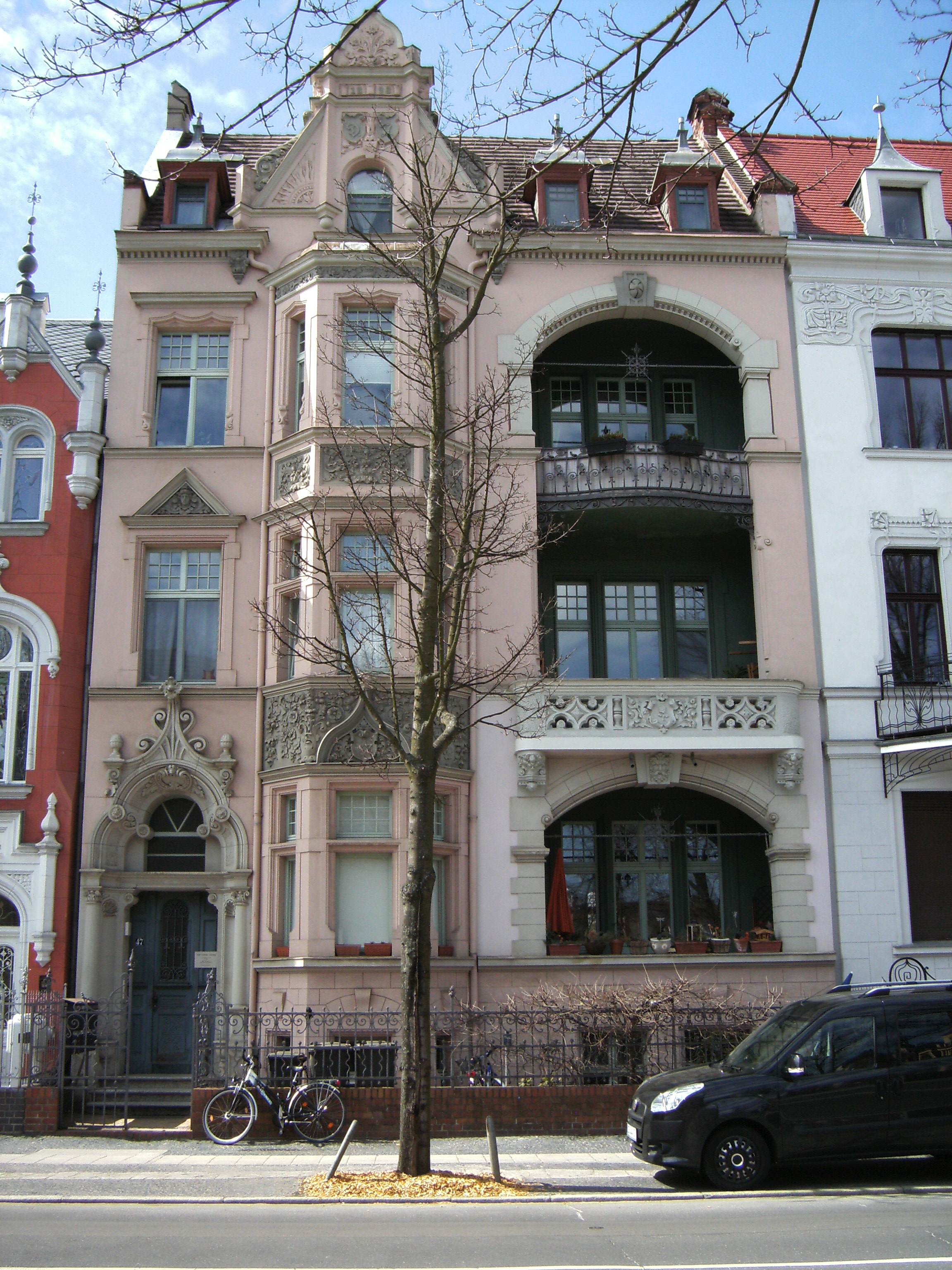 Schillerstraße 47